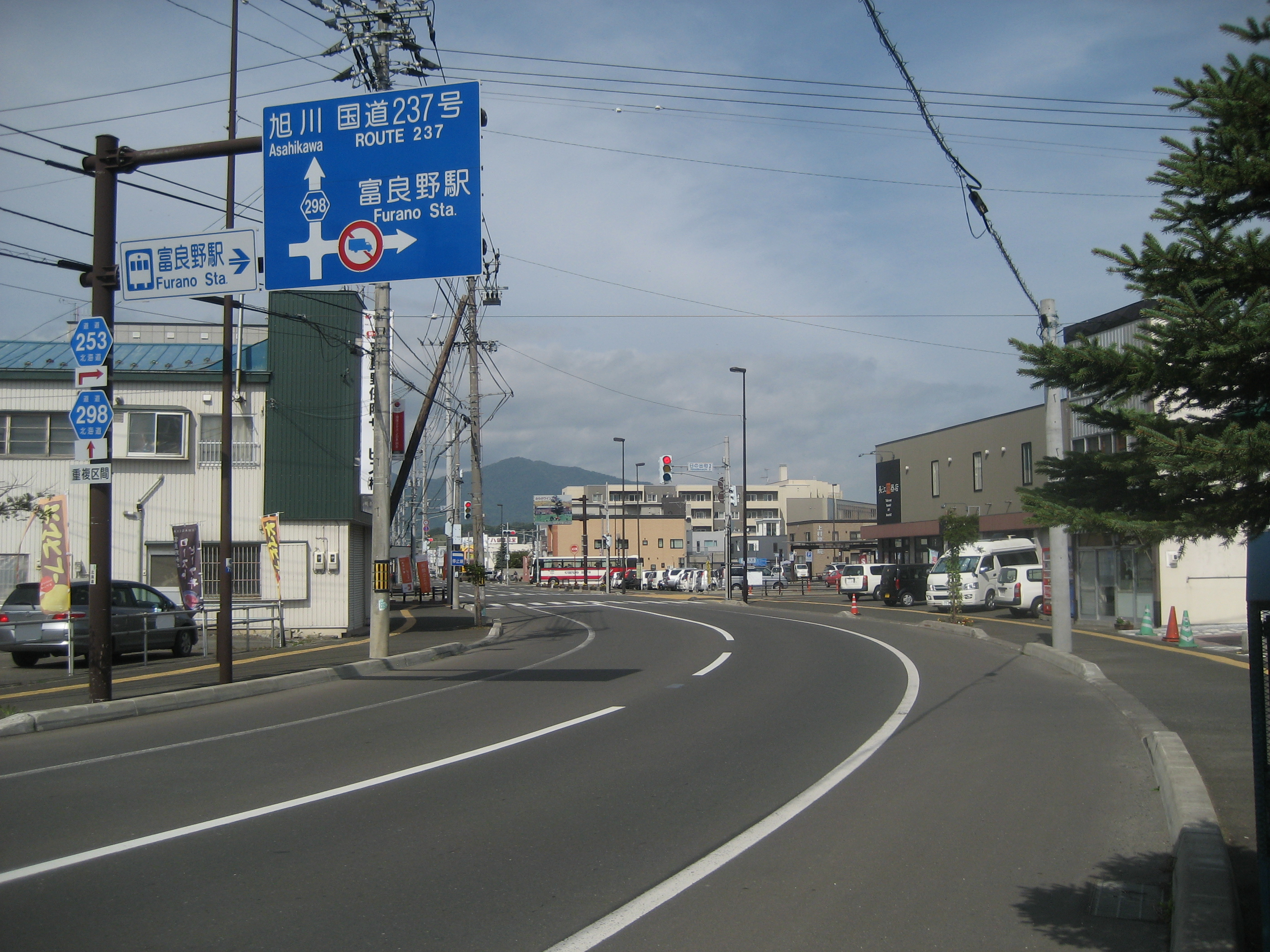 北海道道253号線富良野市富良野駅付近